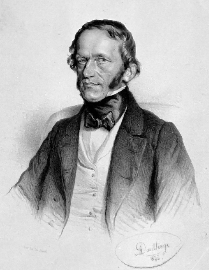 Franz Palacky, Lithographie von Adolf Dauthage